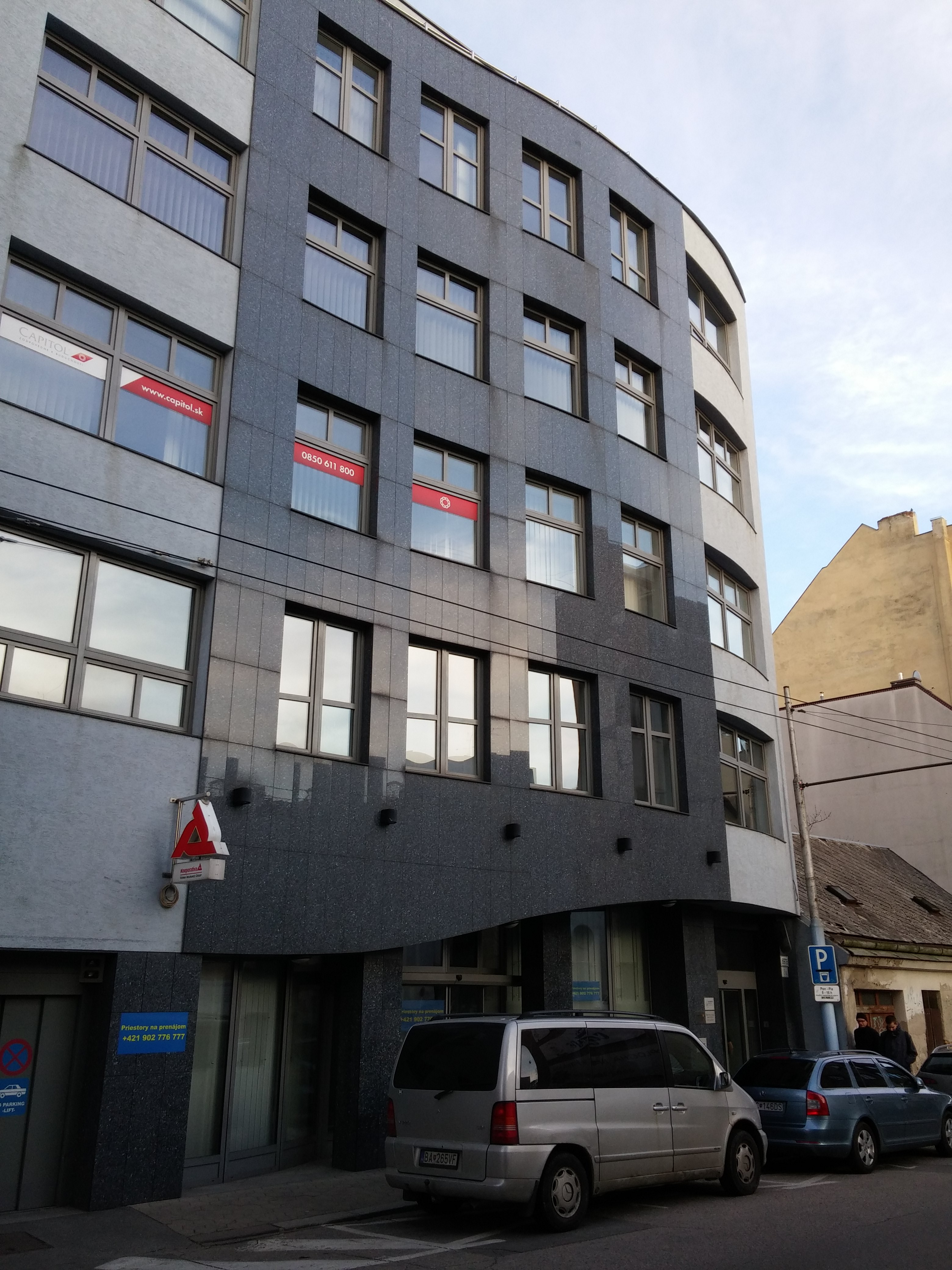 Rajská 15A, Staré Mesto, Bratislava